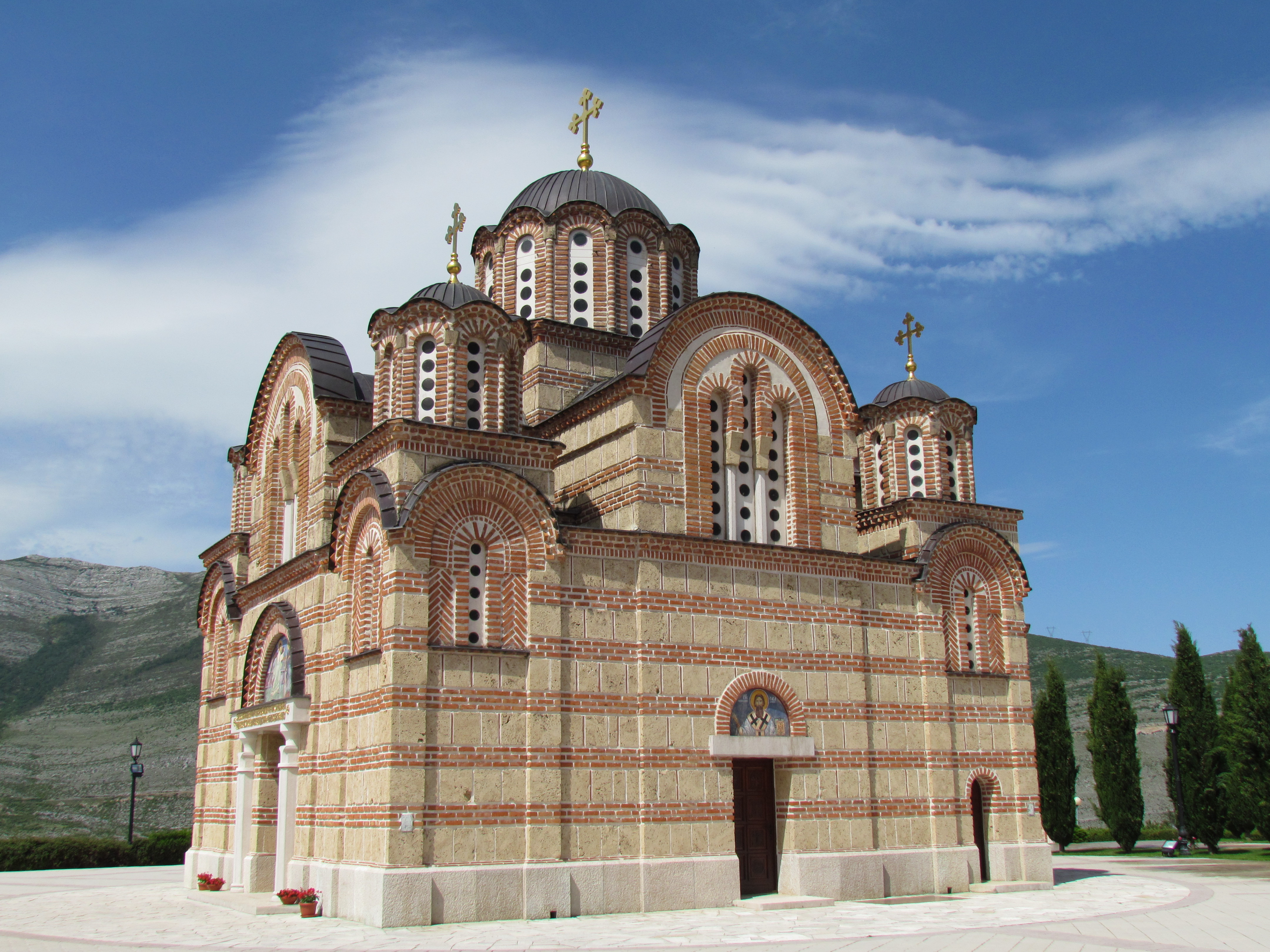 Hercegovska Gračanica je verna kopija samostanske cerkve Gračanica na Kosovu. Zgrajena je bila leta 2000 na griču Crkvina nad Trebinjem, da bi se izpolnila zadnja želja slavnega trebinjskega pesnika Jovana Dučića.